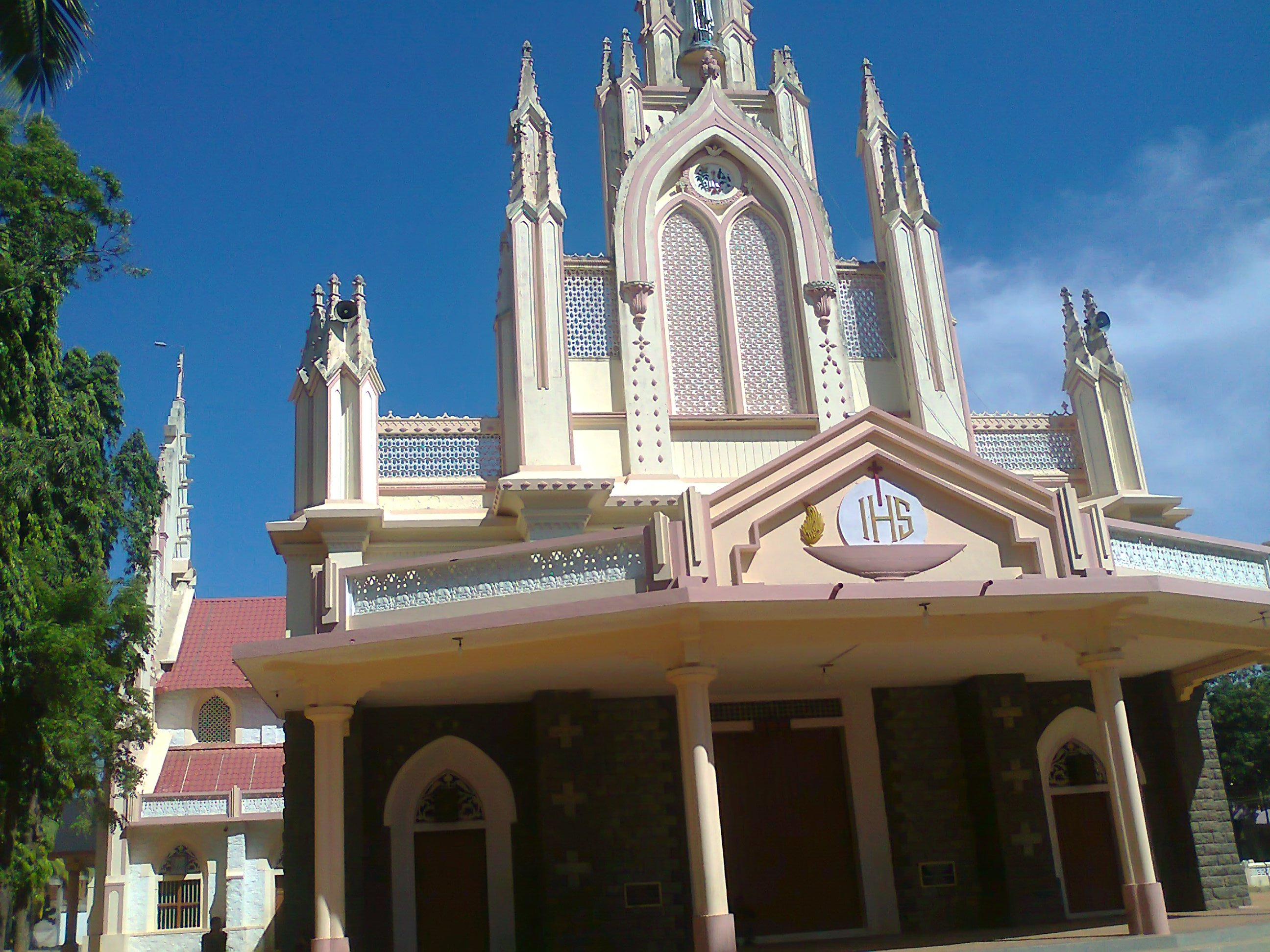 கண்டன்விளையில் அமைந்துள்ள புனித குழந்தை இயேசுவின் திரேசாள் ஆலயம்